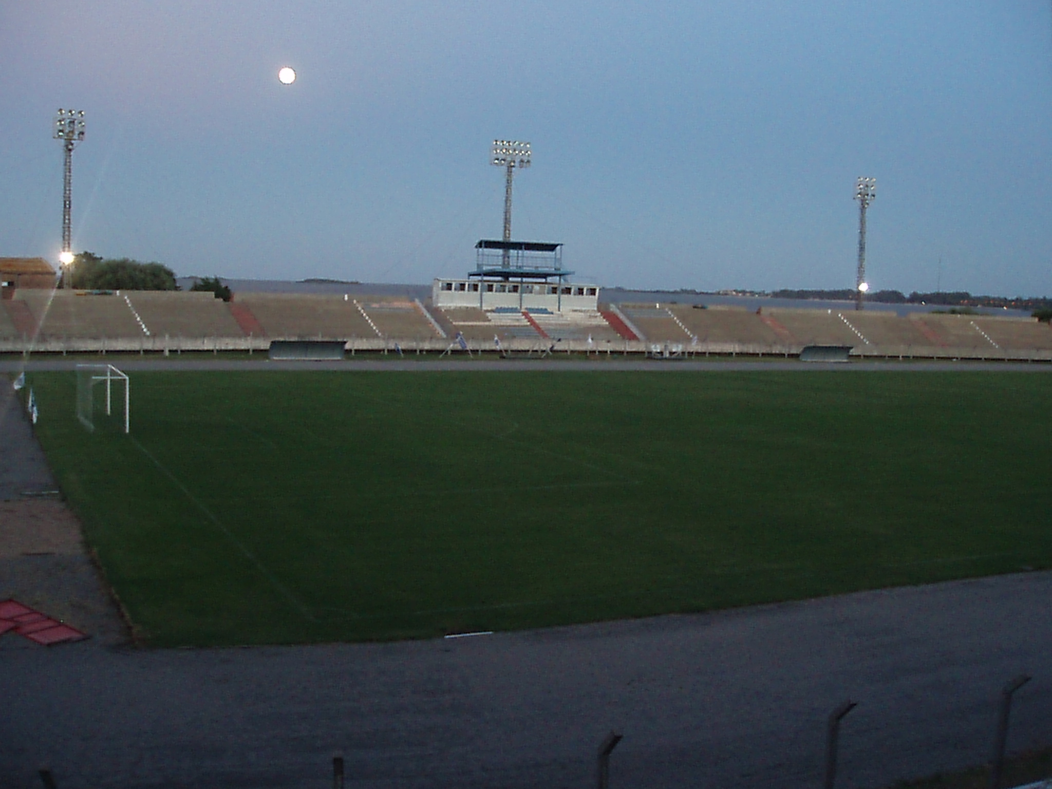 Campus Municipal Profesor Alberto Suppici, Colonia del Sacramento, Uruguay